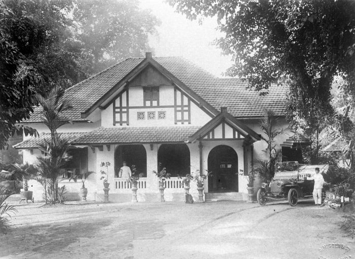 Repronegatief. Woning van een hoofdambtenaar te Tandjoengpandan